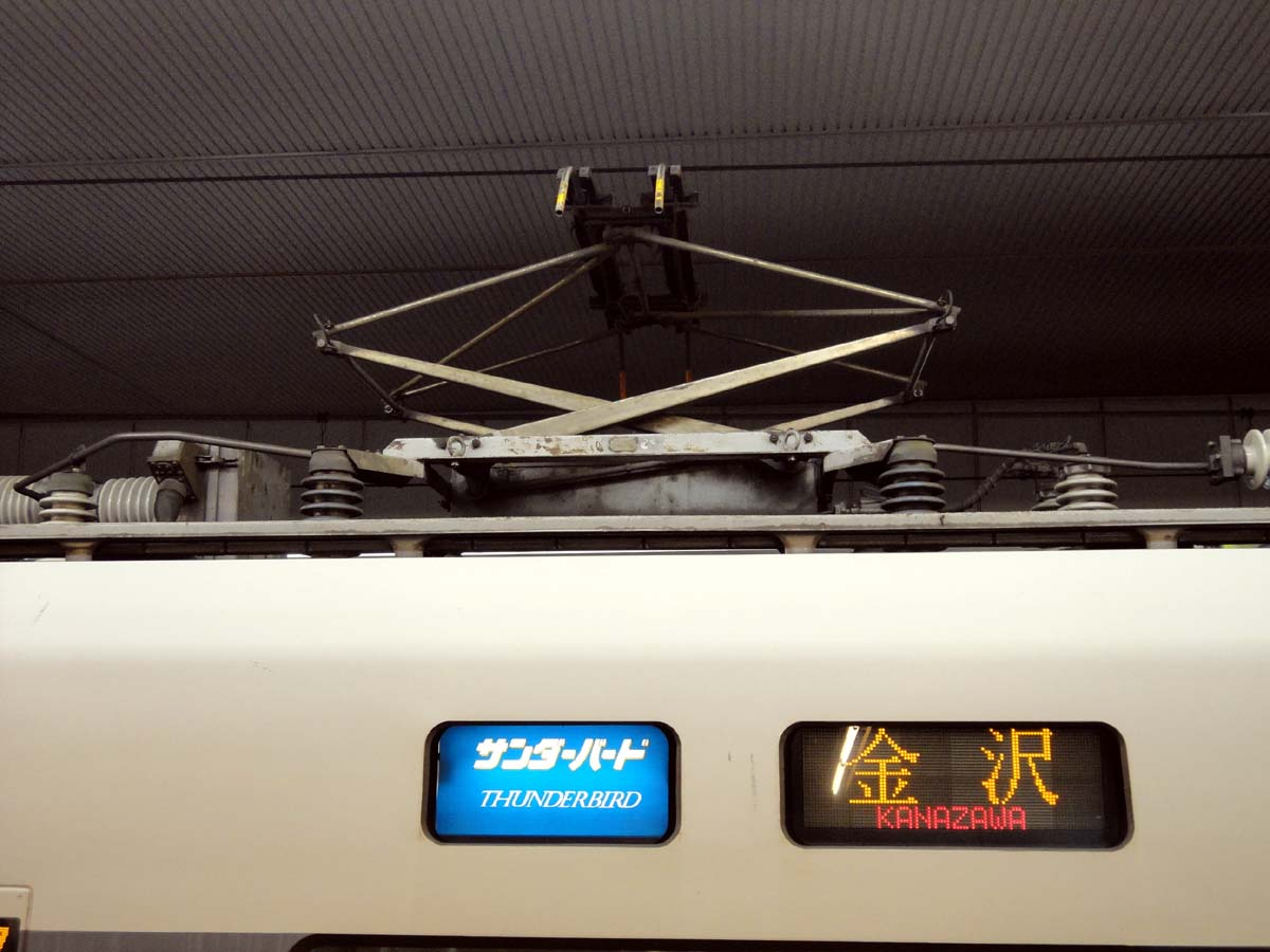 JR西日本683系0番台パンタグラフ